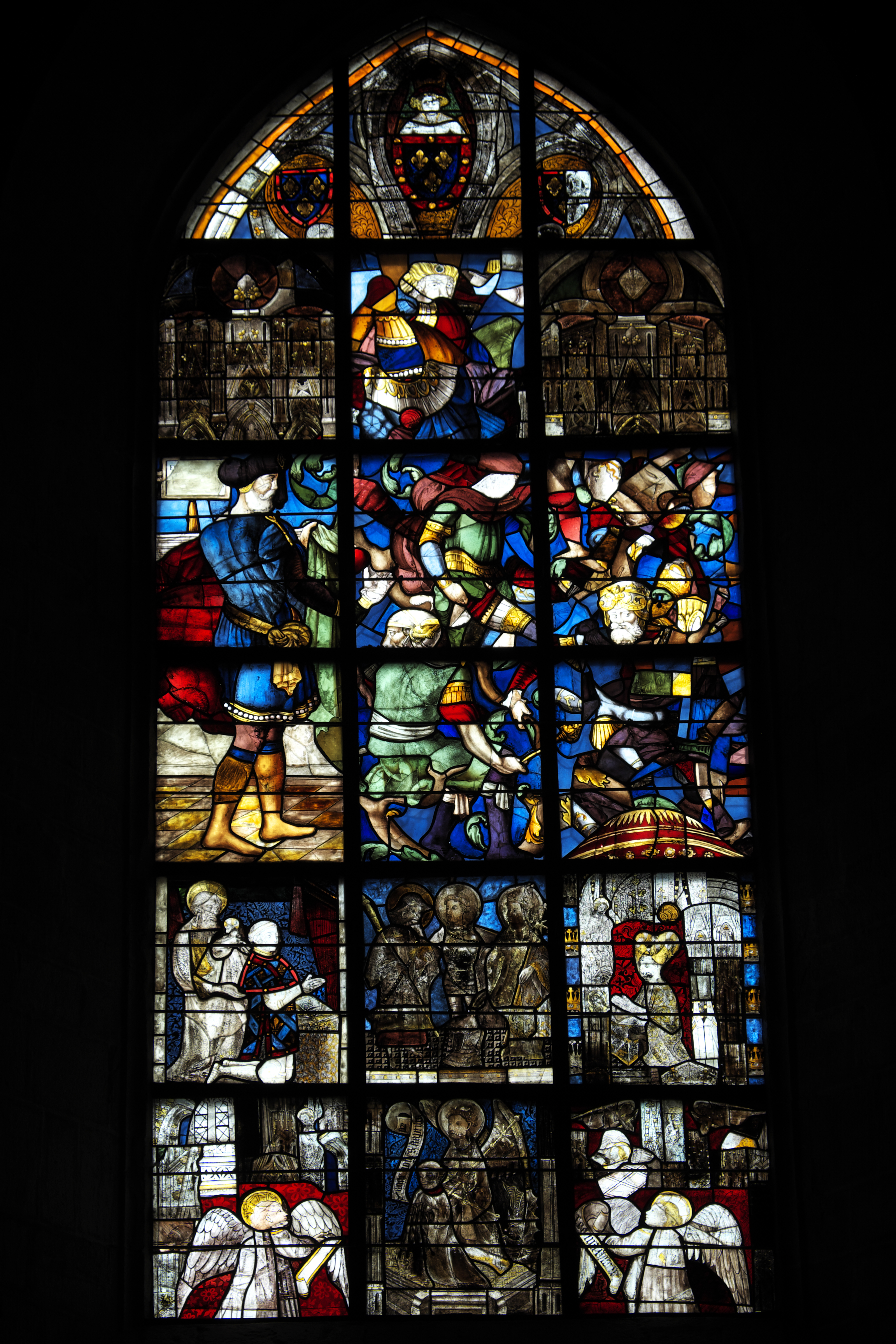 Basilika Notre-Dame-de-l'Assomption in La Guerche-de-Bretagne im Département Ille-et-Vilaine (Bretagne/Frankreich), Bleiglasfenster mit Fragmenten aus dem 15. und 16. Jahrhundert; Darstellung: Baum Jesse, Stifter u.a.